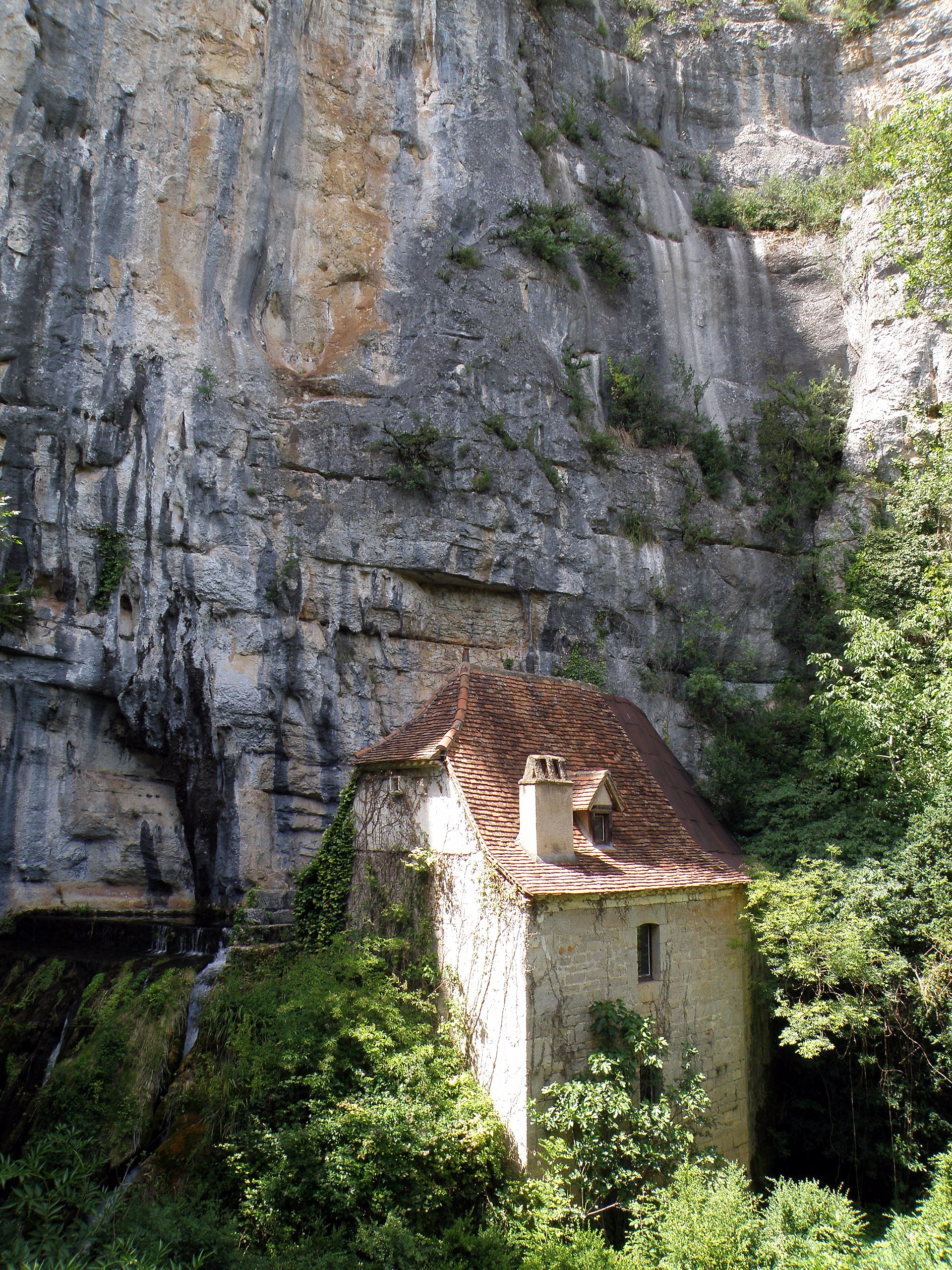 Cabrerets, commune et village dans le département du Lot (région Midi-Pyrénées, France), situés sur le Célé, affluent droit du Lot, à une vingtaine de km (à vol d’oiseau) à l’est-nord-est de Cahors. Hameau de la Pescalerie, situé à env. 2 km au nord-est du village, en amont sur la rive droite du Célé. Moulin à eau construit à l'endroit d'une source vauclusienne.